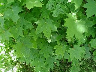 Acer platanoides